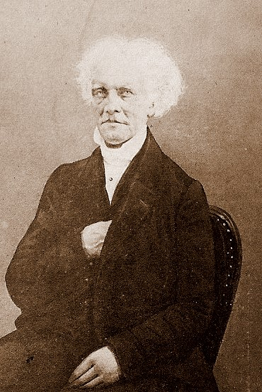 une photographie familiale